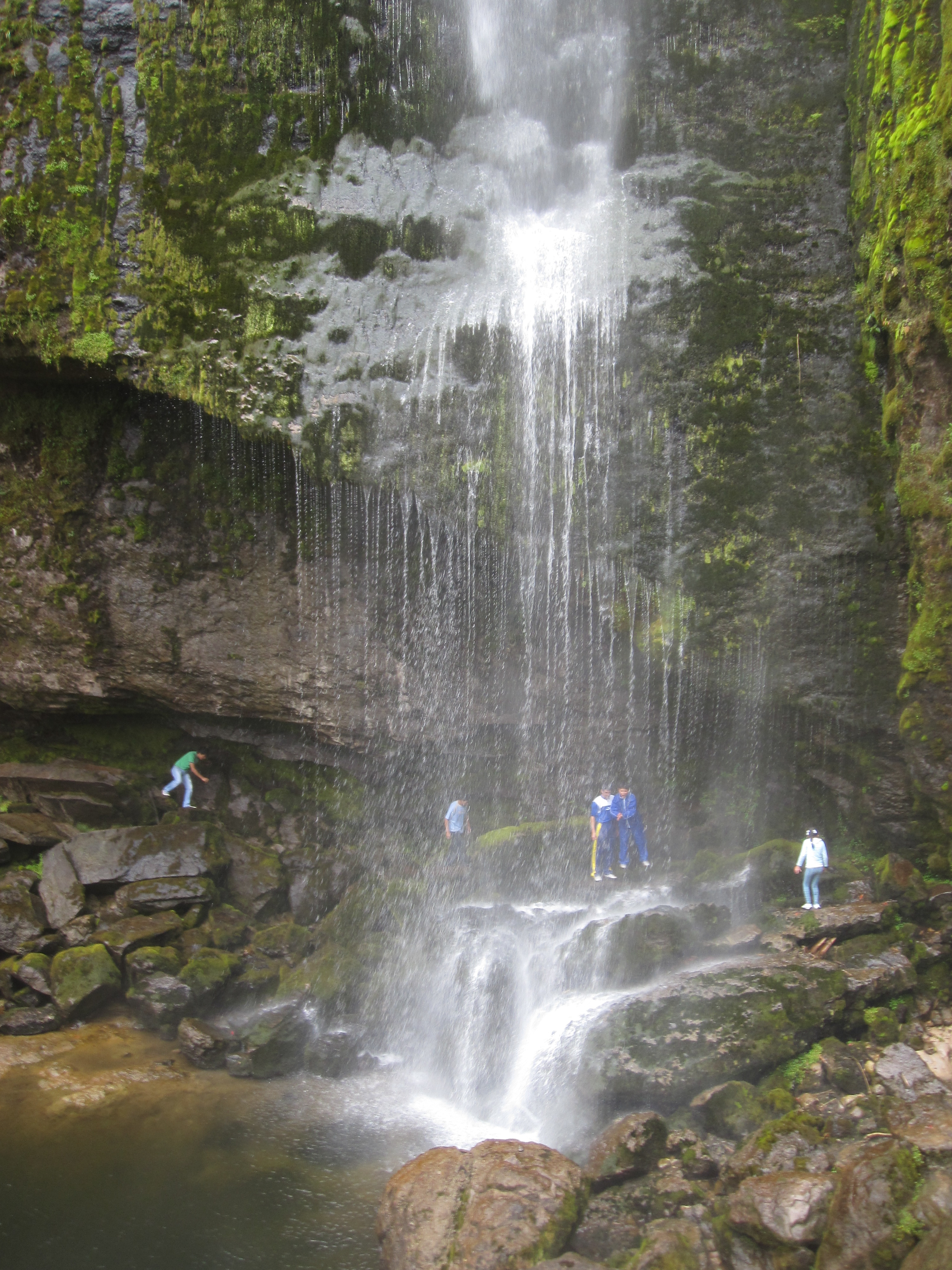 Chorro de Girón